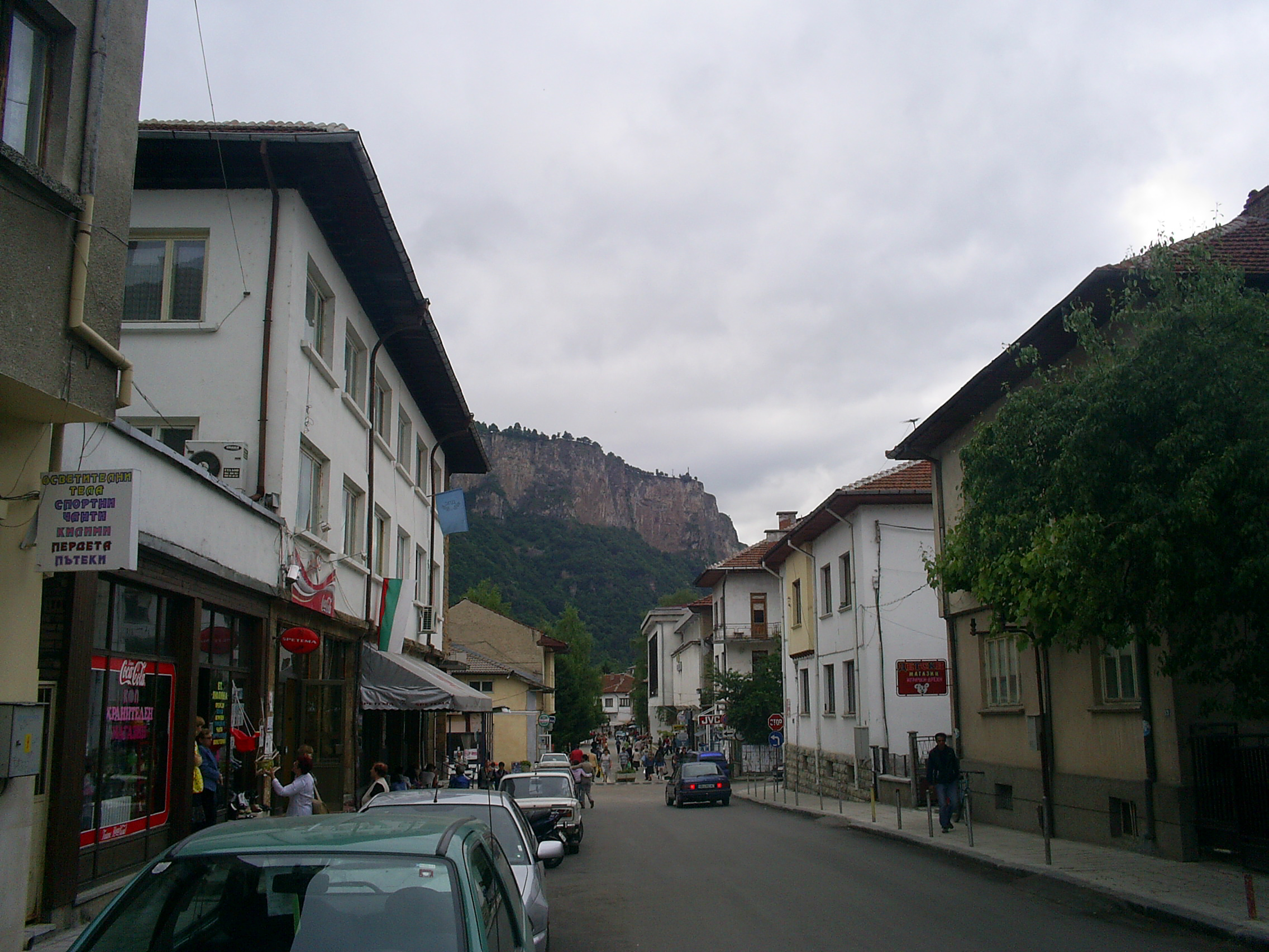 Street in Teteven, Bulgaria